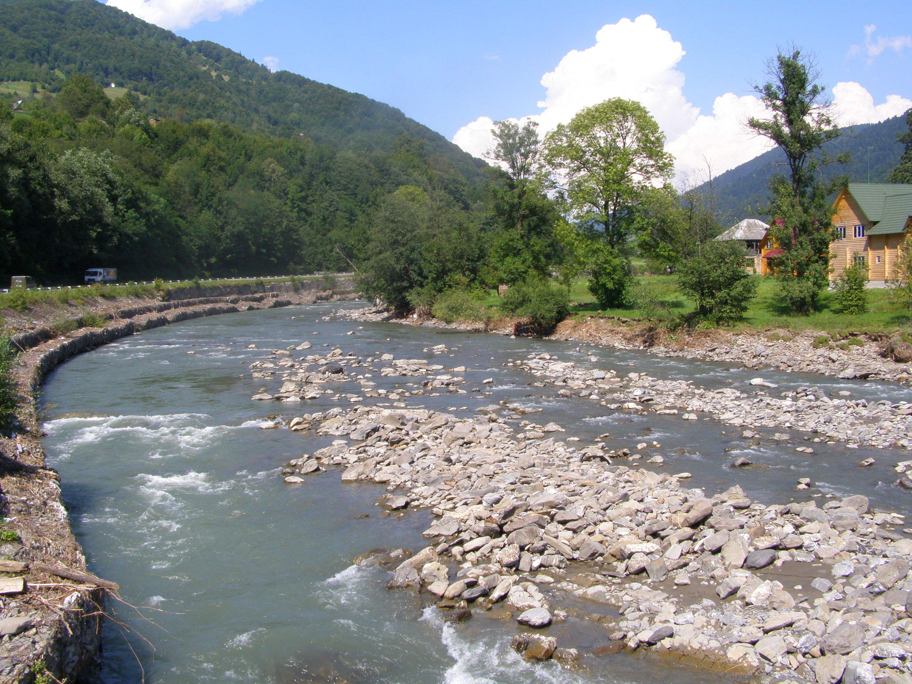 Černá Tisa protékající vesnicí Kvasy